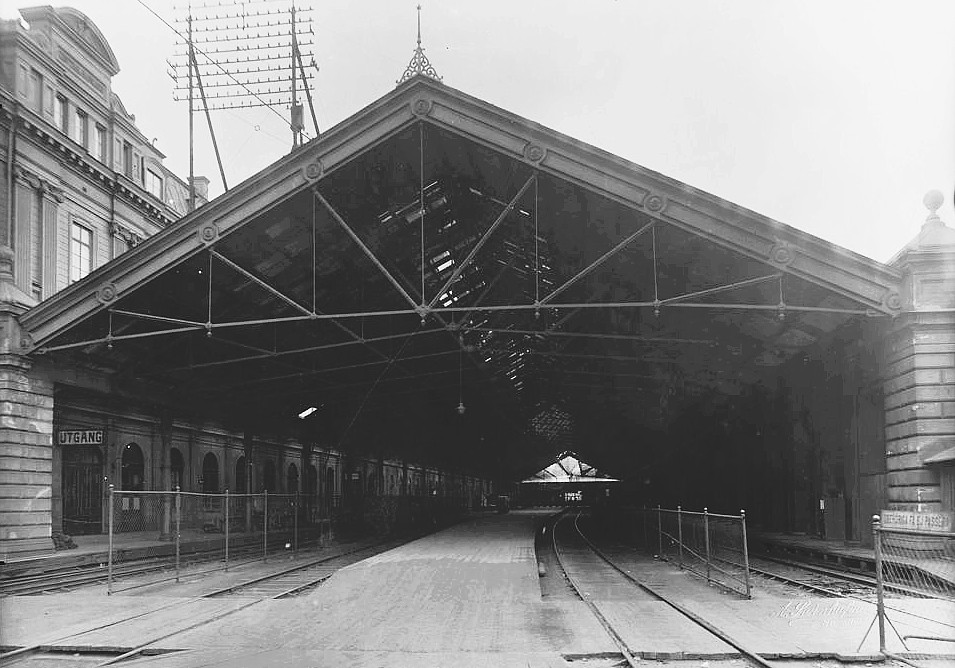 Banhallen 1907, fotograferad av Axel Swinhufvud. Ingår i Järnvägsmussets samlingar. Sveriges Järnvägsmuseum, KDAA09590, Axel Swinhufvud